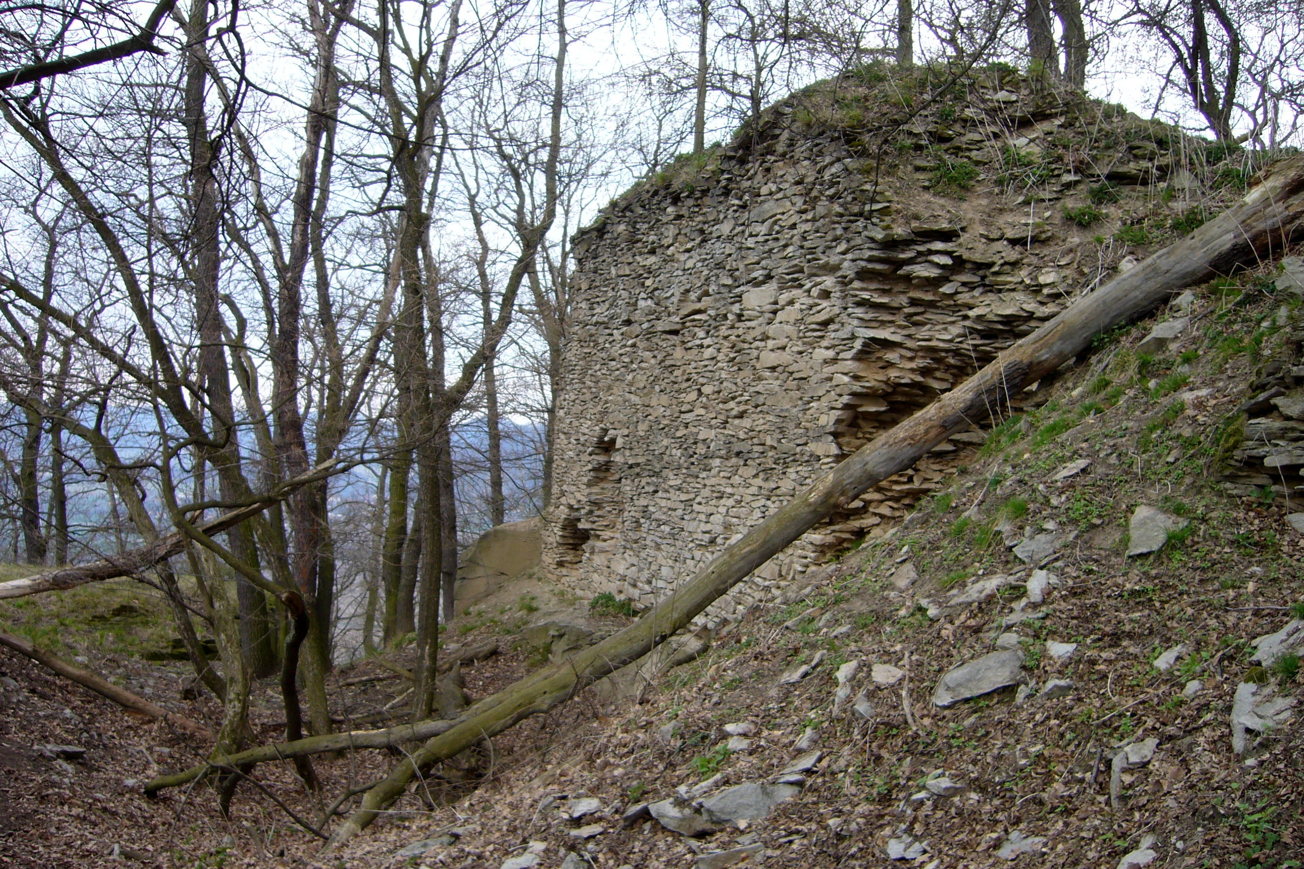 Jihozápadní hradba jádra, Hrad Litýš, Soběnice.